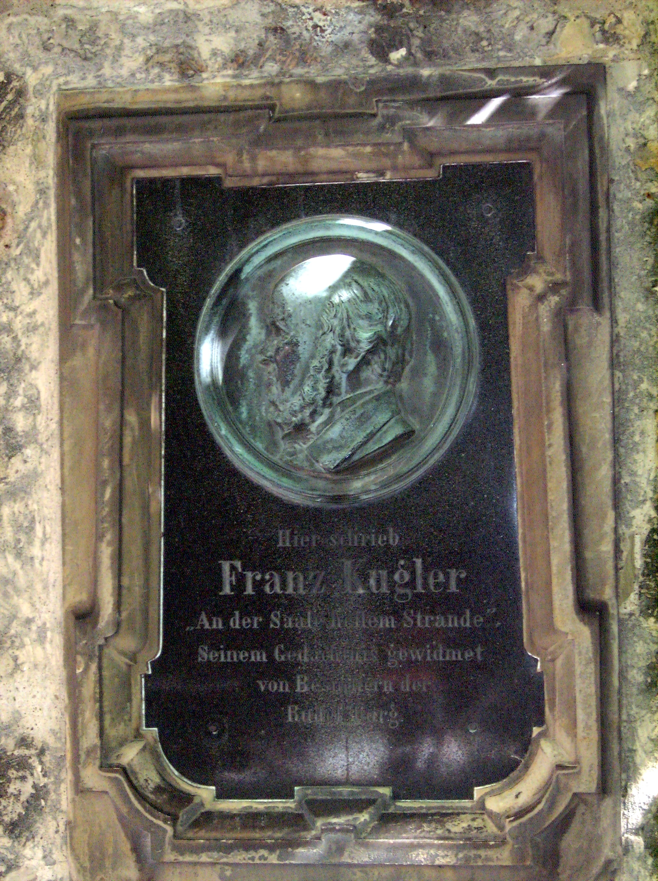 Rudelsburg, Gedenkplatte für Franz Kugler, den Dichter von "An der Saale hellem Strande"